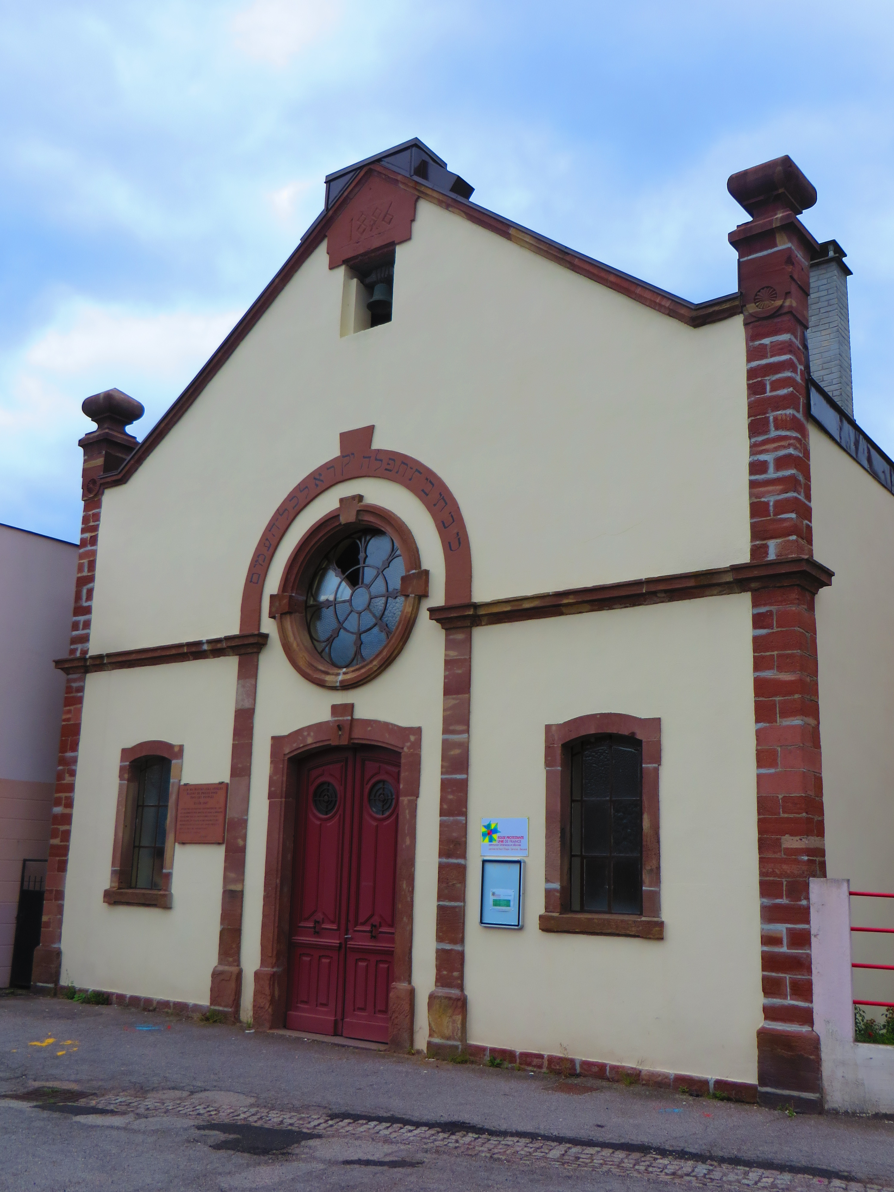 Senones ancienne synagogue temple